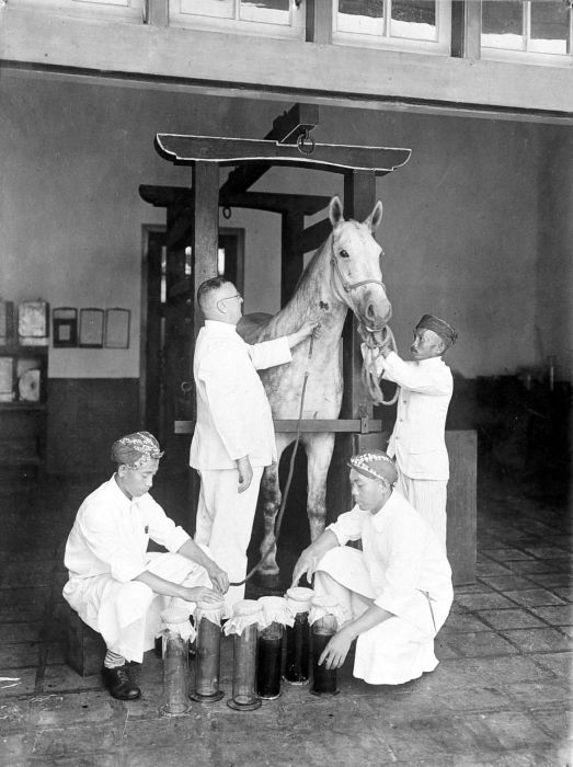 Negatief. De heer Raahe neemt met drie andere werknemers bloed af van een geïmuniseerd paard op het geneeskundig onderzoekscentrum Instituut Pasteur te Bandoeng, West-Java